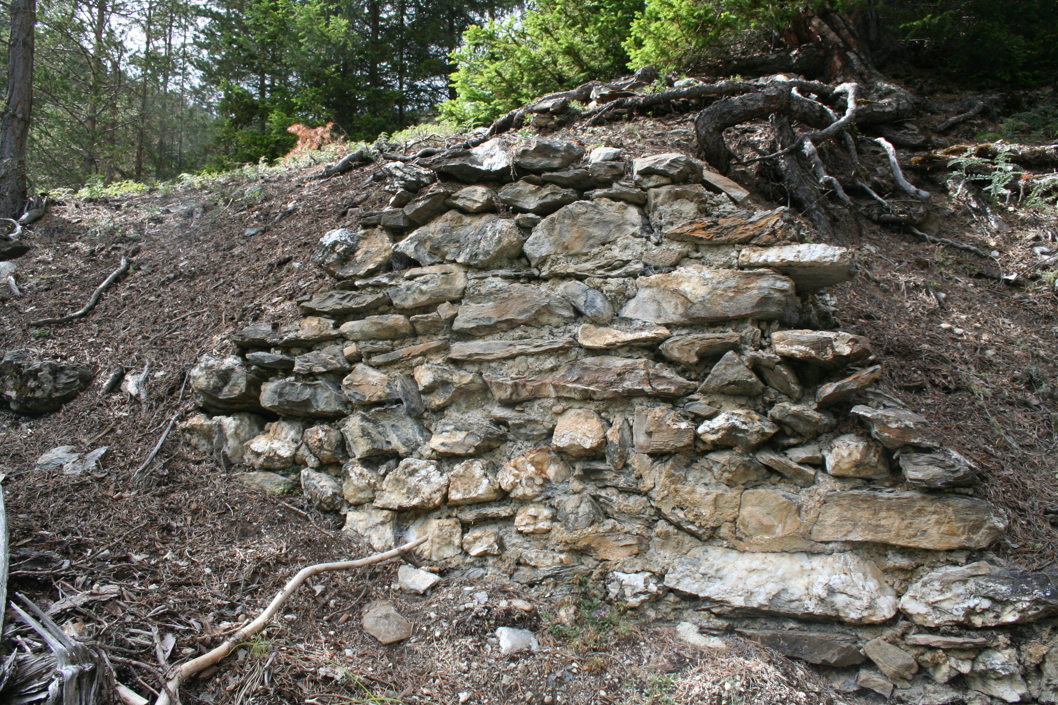 Beringrest im Süden